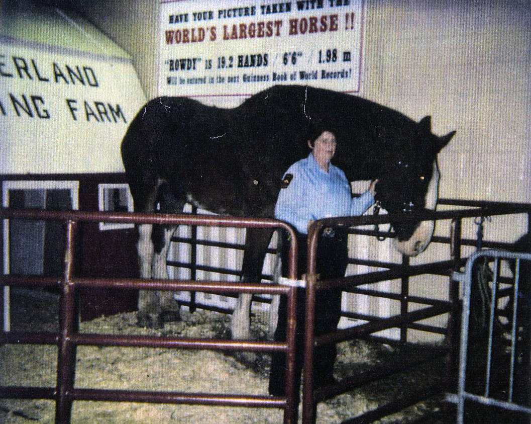 Rowdi - das gößte Pferd der Welt